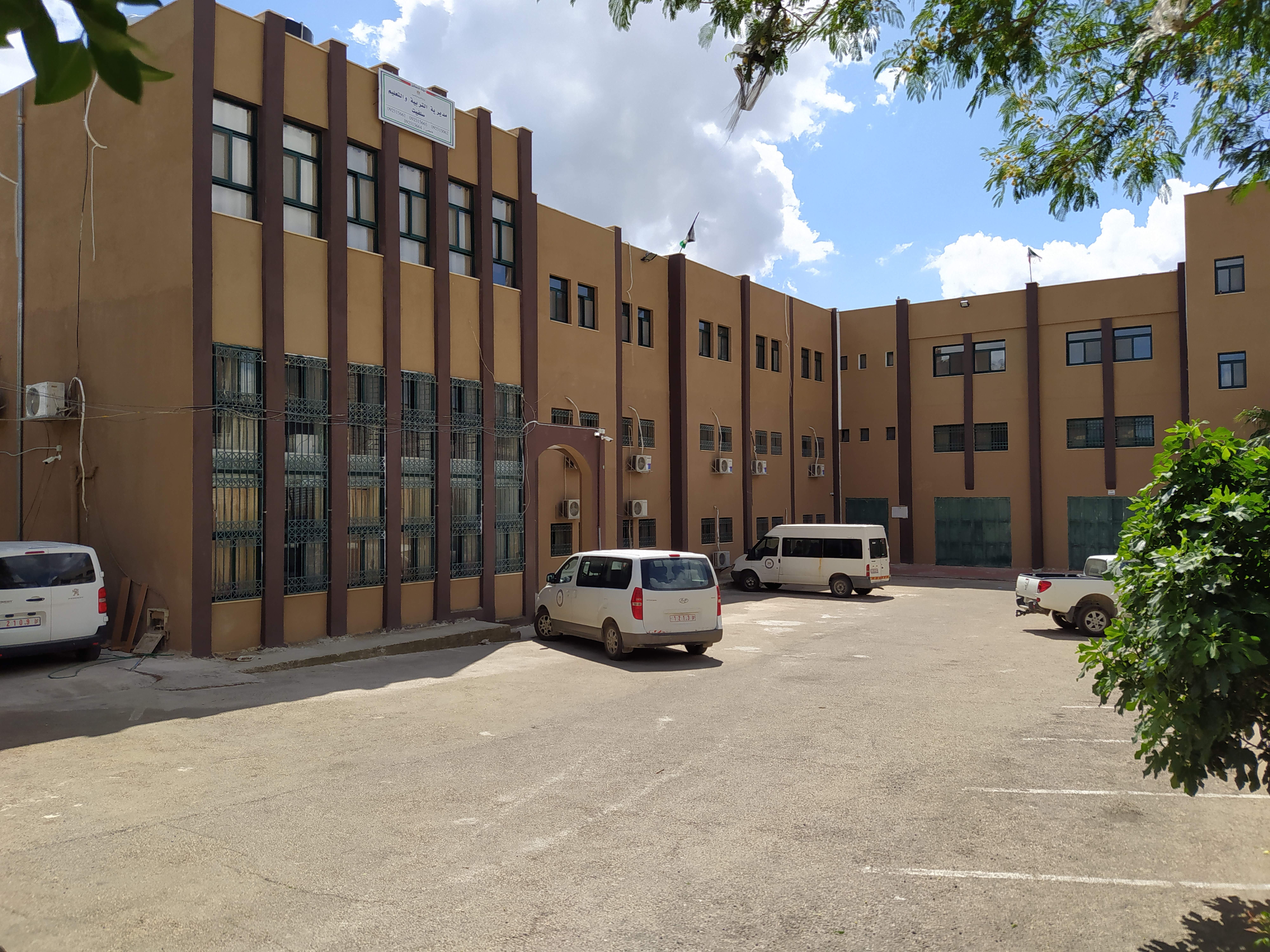 مبنى مديرية التربية والتعليم والتعليم العالي في محافظة سلفيت